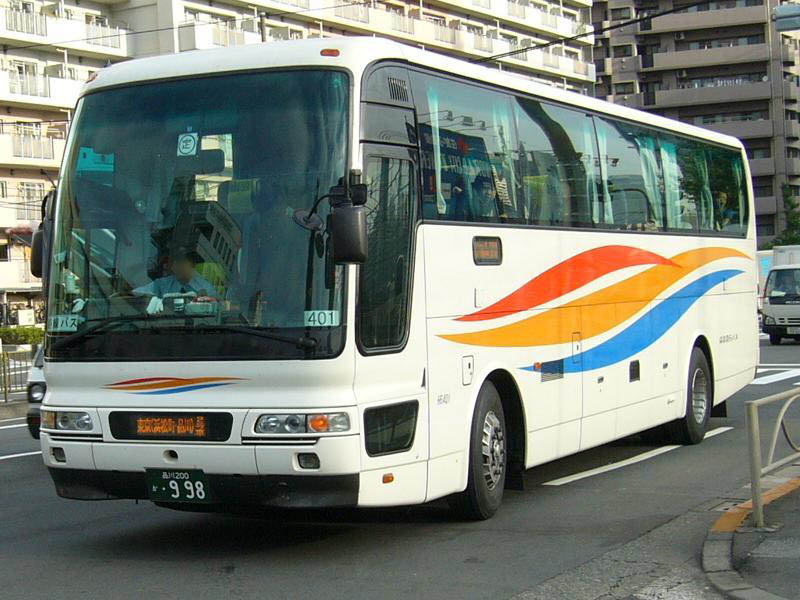 登録番号：品川200か・998 京浜急行バス羽田営業所所属 car no.6401 高速用車両（各系統で共通運用） 三菱ふそう・エアロクィーン PJ-MS86JP